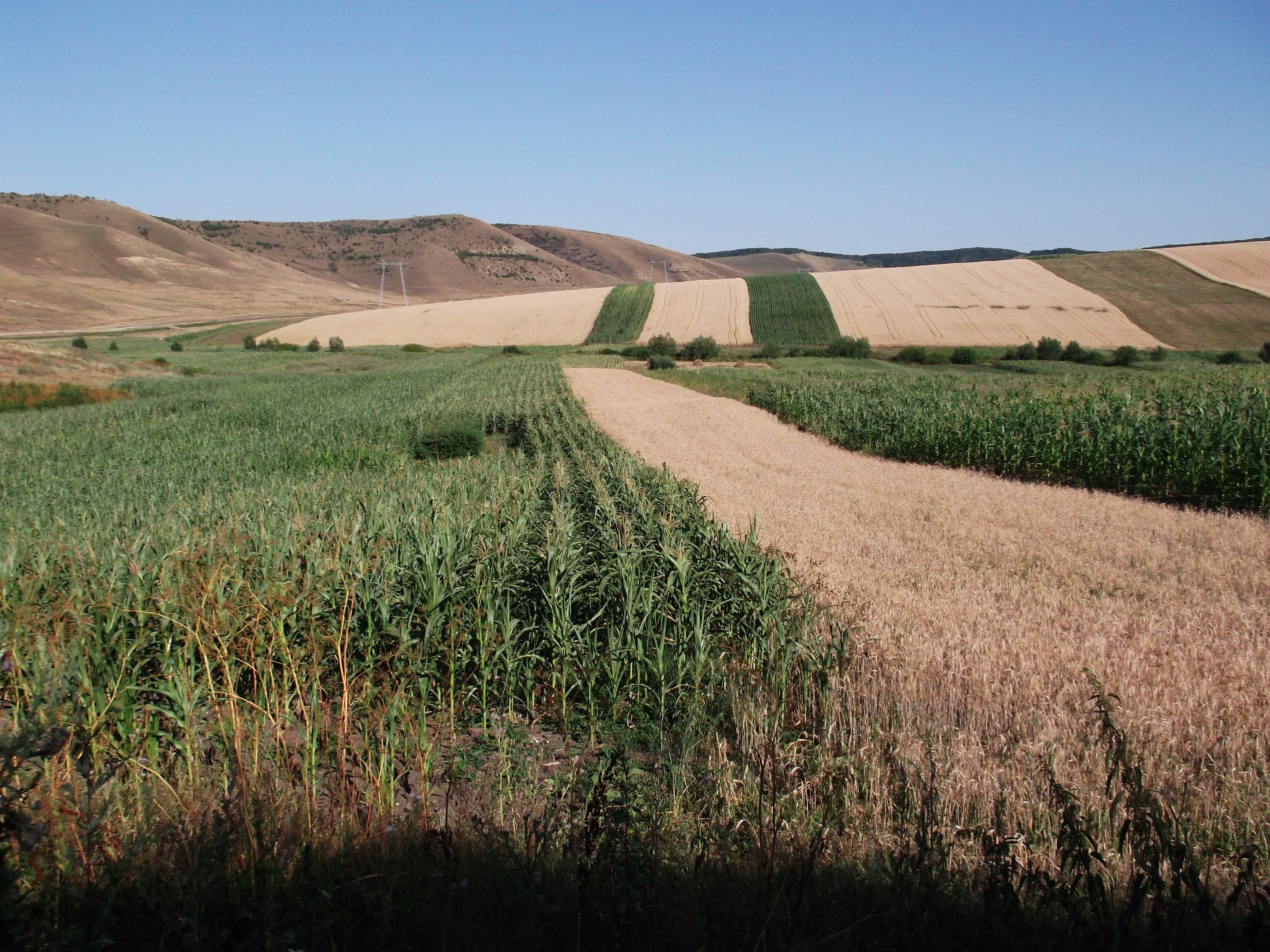 Aruncuta - culturi cereale { griu si porumb }.